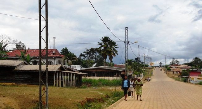 Une rue à Medouneu